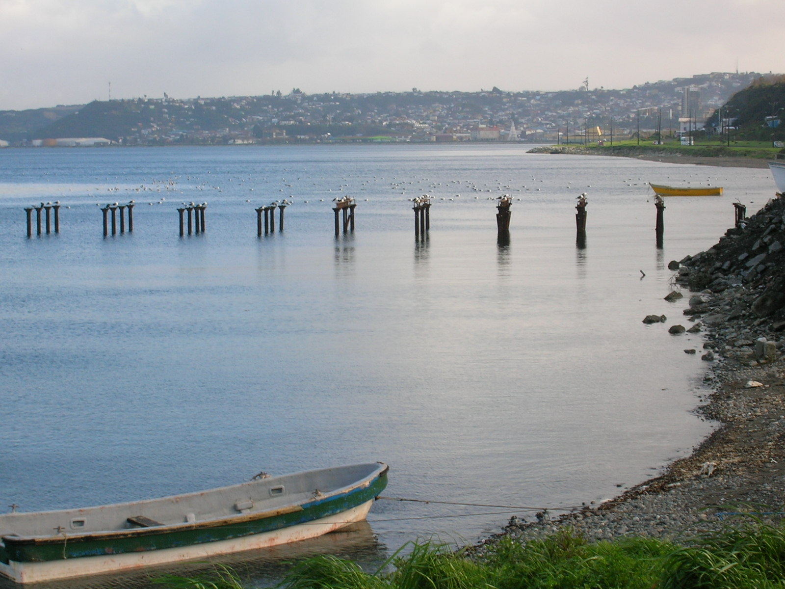 Vista de Puerto Montt desde el camino a Pelluco - Chile